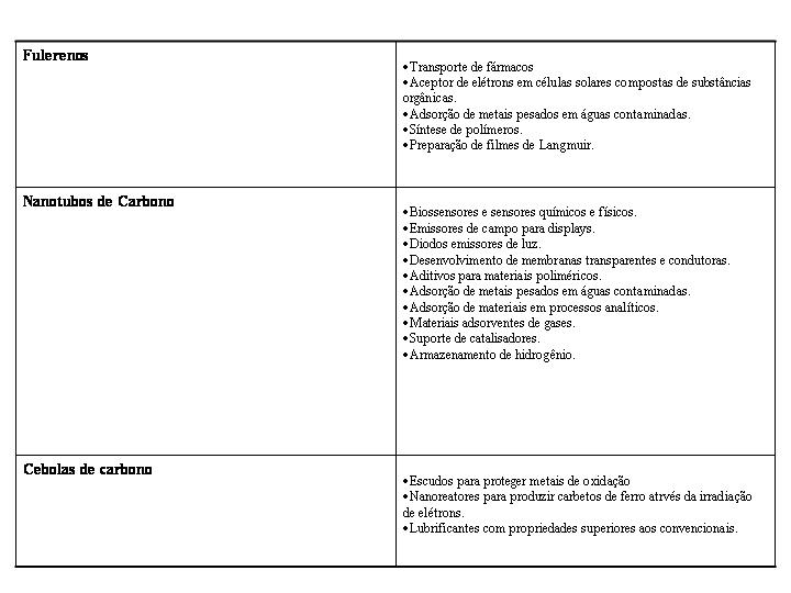 fig 19